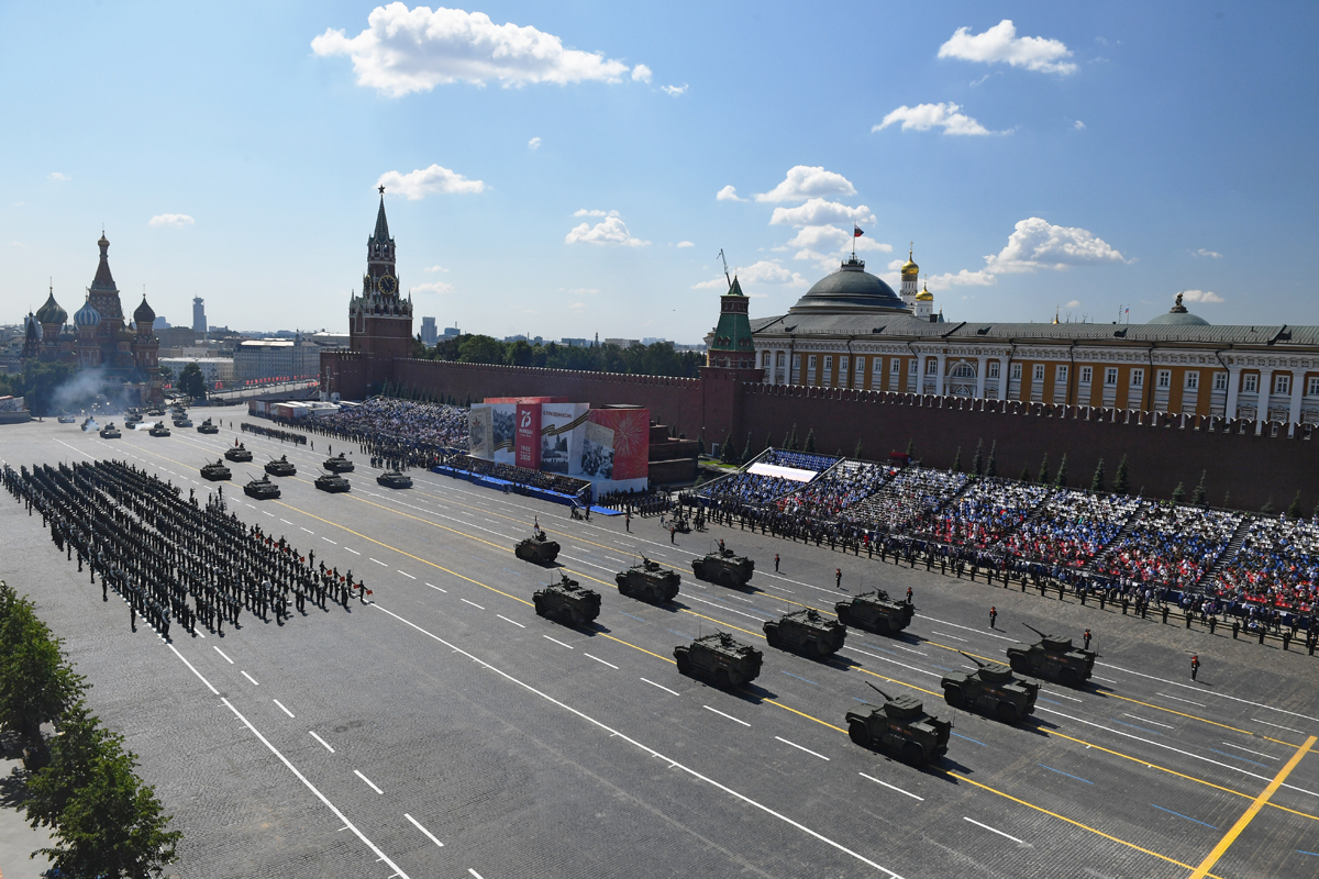 Парад Победы в Москве, посвященный 75-й годовщине Победы в Великой Отечественной войне